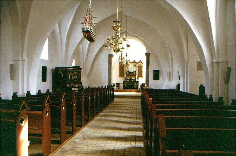 Gunderup Kirke i Danmark. Skib set mod øst